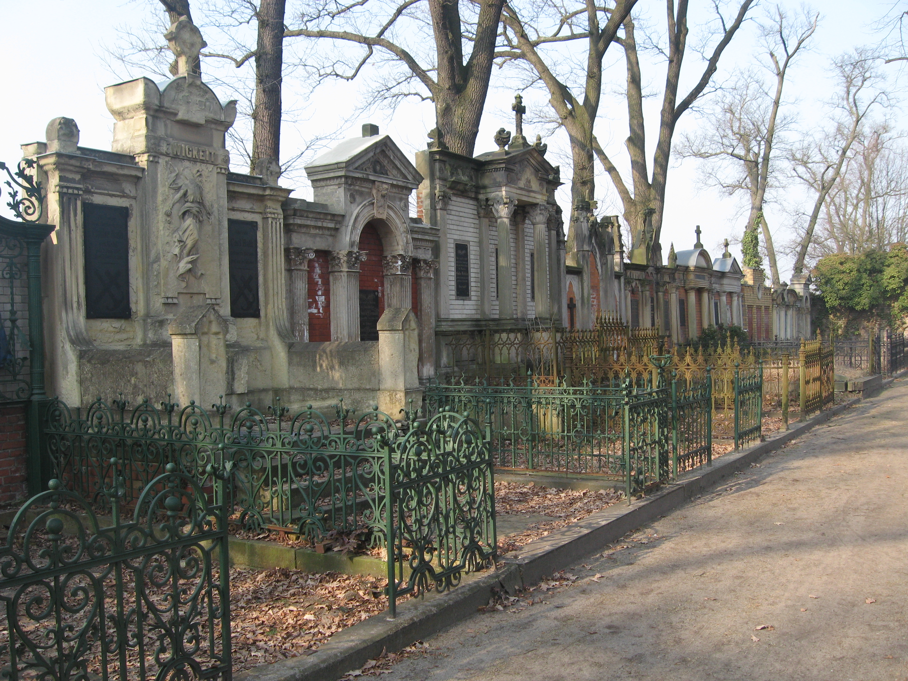 Teil einer unter Denkmalschutz stehenden Erbbegräbnisreihe auf dem städischen Friedhof in Oranienburg